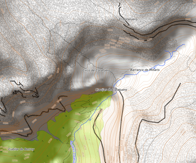 carte réalisée sur umap This map may be incomplete, and may contain errors. Don't rely solely on it for navigation.